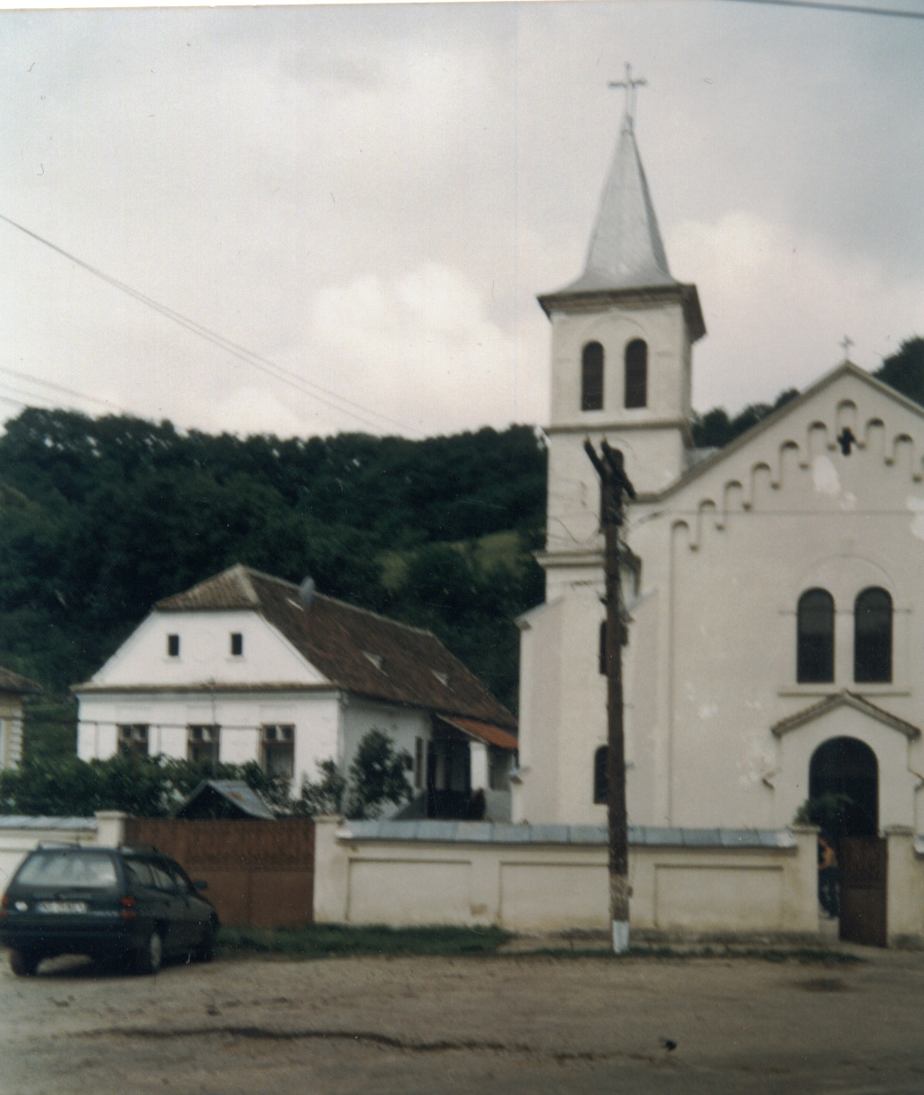 Bólyai katolikus temploma (Szeben megye, Erdély)